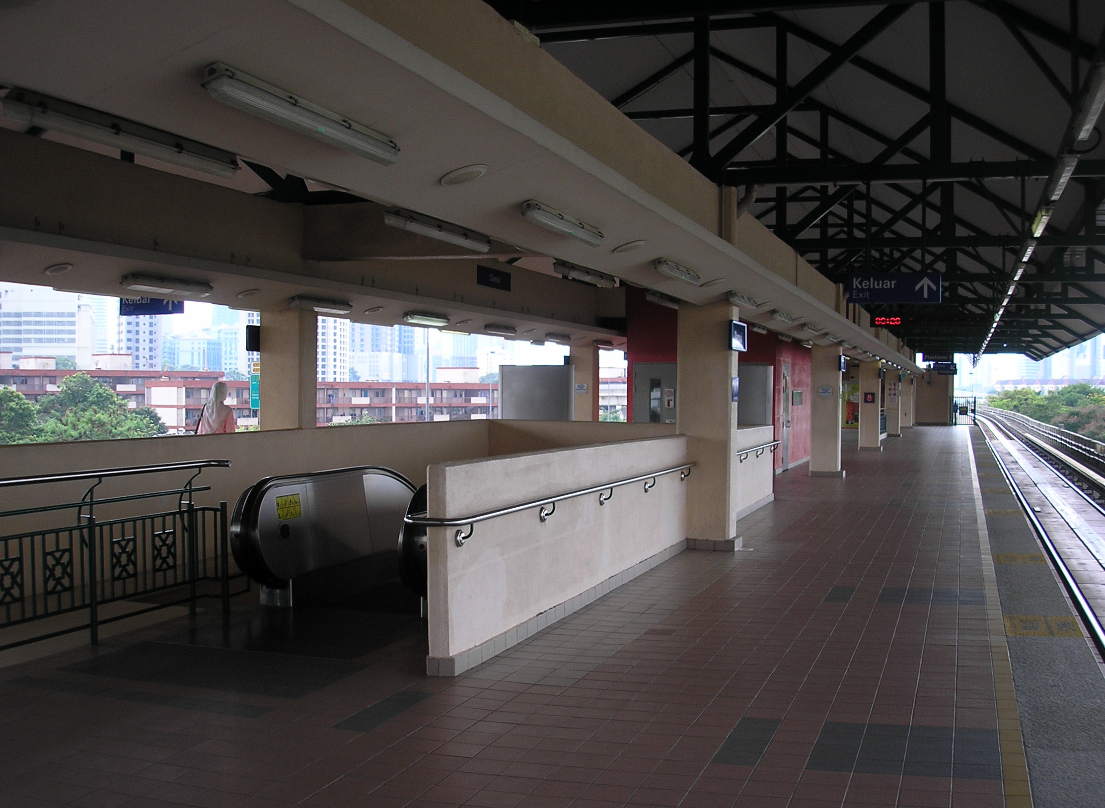 The Damai LRT station (Kelana Jaya Line), Kuala Lumpur, Malaysia.